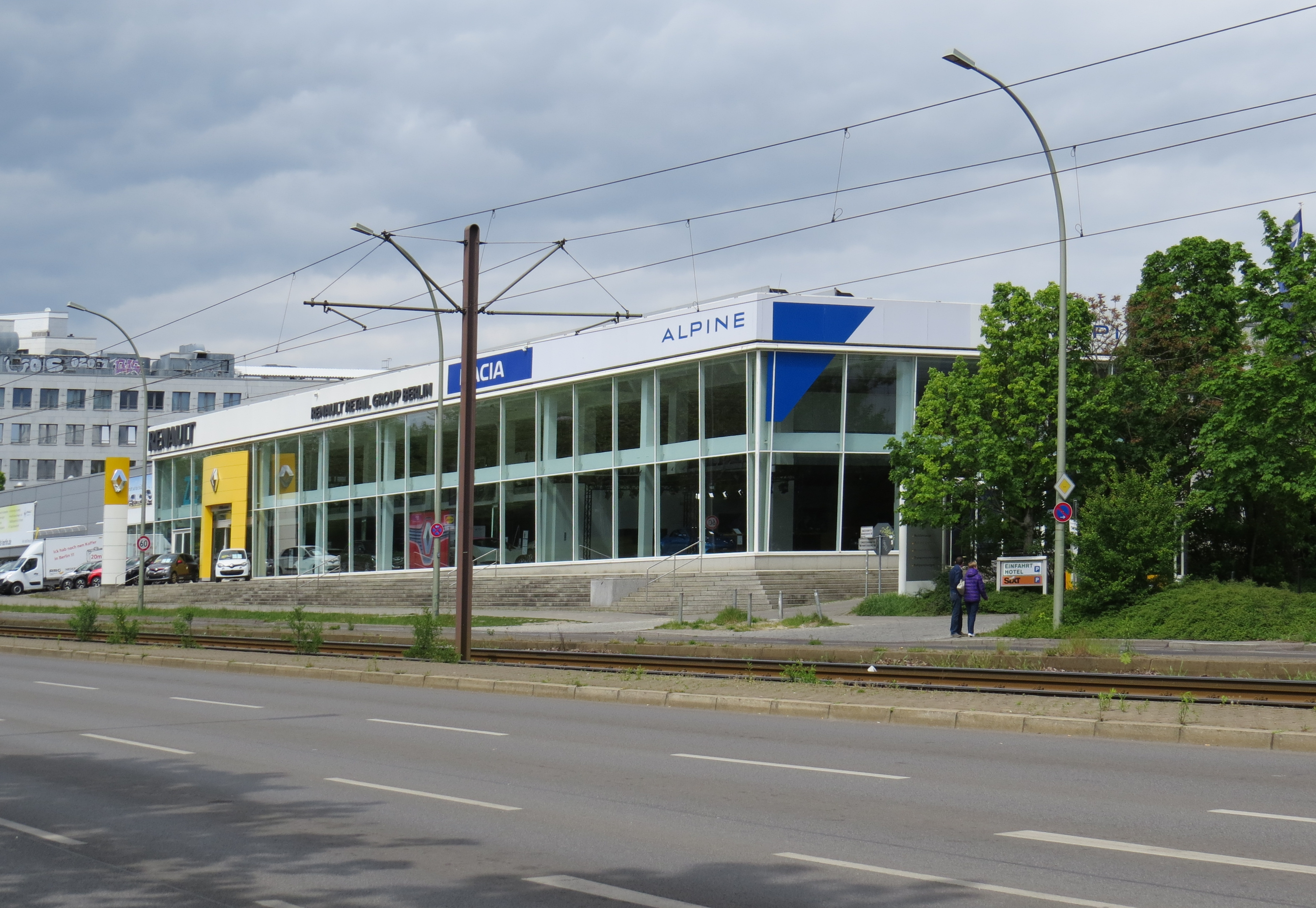 Weißenseer Weg